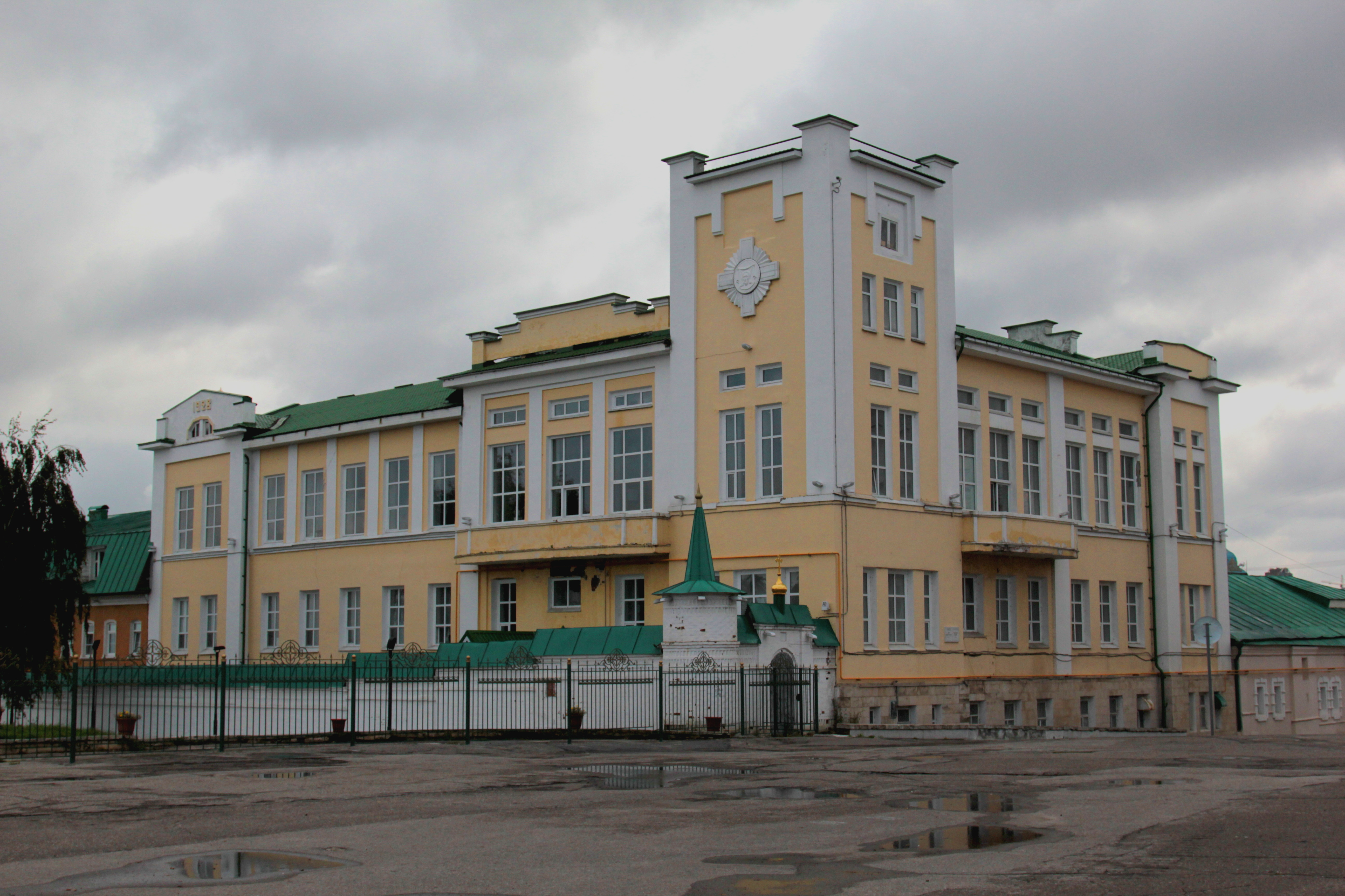 Дом крестьянина (Чувашская Республика, Чебоксары, Константина Иванова улица, 5 (Р. Люксембург, 16))